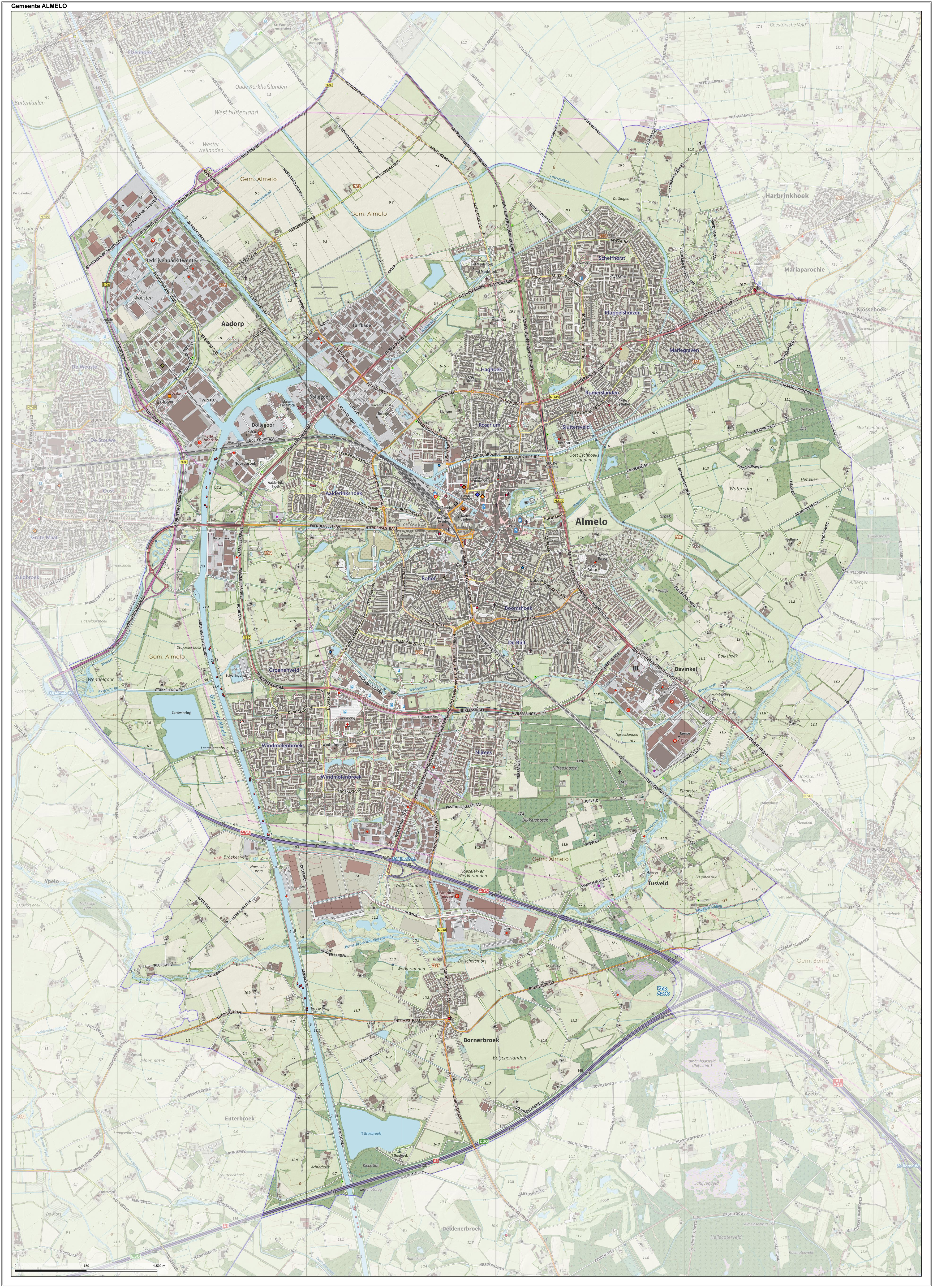 Topografische gemeentekaart. Resolutie: 400 pixels/km. Kaartbeeld samengesteld uit de open geodata van de Top10NL en Top25namen (Kadaster), Creative Commons-BY licentie. Gebouwvlakken uit open geodata BAG extract. Wegen uit de OpenStreetMap, OpenStreetMap community. Reliëfschaduw uit de Actuele Hoogtekaart AHN2. Samenstelling en kleurenschema: Jan-Willem van Aalst, met QGIS. Zie ook de Legenda.